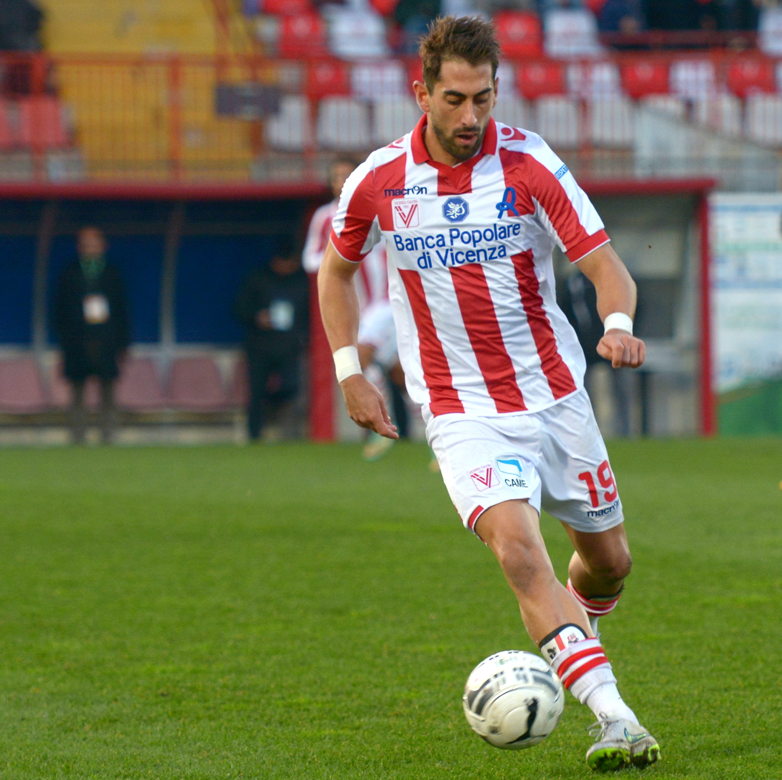 Andrea Cocco, attaccante sardo.